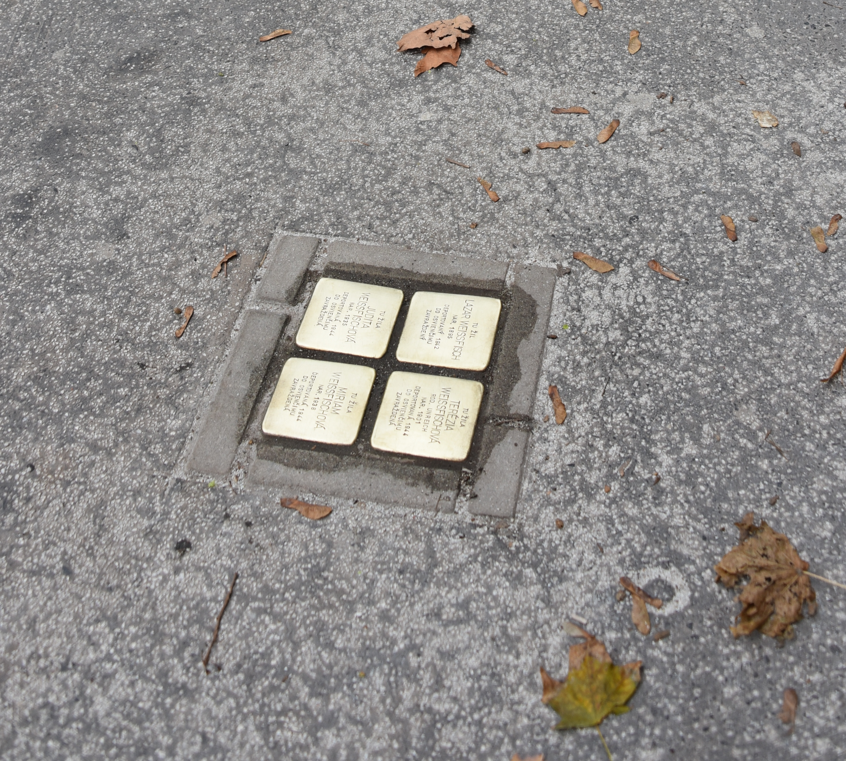 Stolpersteine in Bratislava